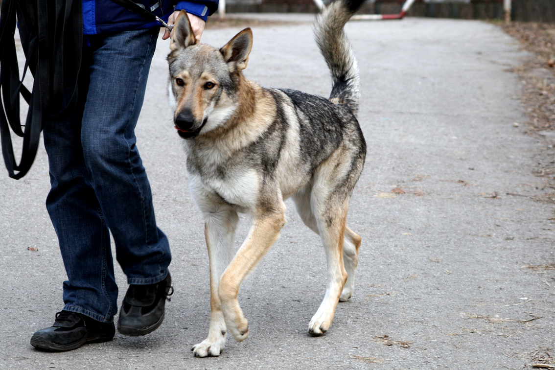 Československý vlčiak